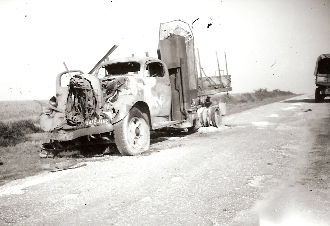 Autre photo du camion des artificiers après l’attaque du 28 août 1944